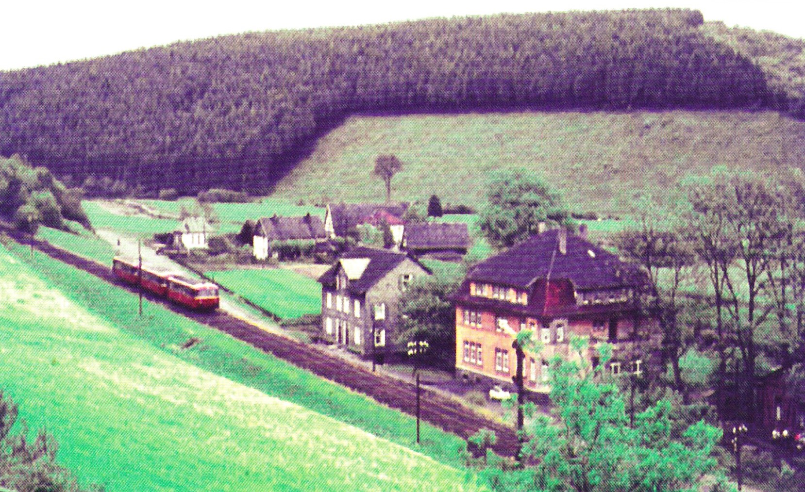 Blick auf den ehemaligen Attendorner Ortsteil Maiwormshammer, der dem Bau der Biggetalsperre (1956–1965) weichen musste. Postkartenfoto um 1960. Text: „Der Ort gehörte zum Gut Listernohl und wurde erstmals als Mühle 1334 und 1387 erwähnt. Seit 1446 ist hier ein Hammerwerk bezeugt. Ein Wohnhaus wurde erstmals 1478 errichtet. Das Hammerwerk, 1854 zu einem Walzwerk erweitert, bestand bis 1931. Das Wohnhaus von Karl Wurm wurde 1901 erbaut. In diesem Haus befand sich bis zur Umsiedlung die Poststelle Listernohl.“ Foto: Archiv Hans-Werner Scharloth